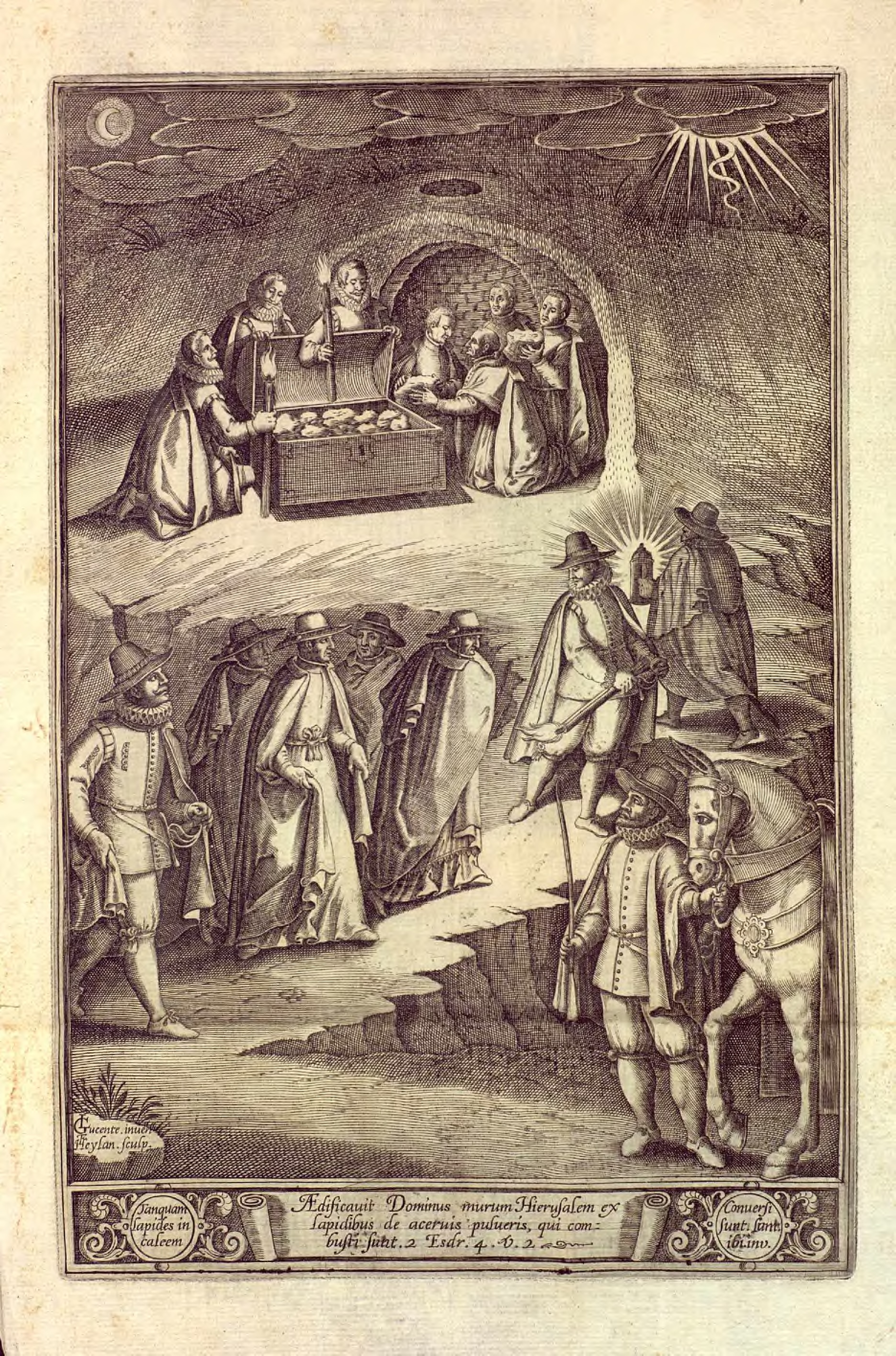 Diego Nicolás Heredia Barnuevo, Mystico ramillete historico, chronologyco, panegyrico, texido de las tres fragrantes flores del nobilissimo antiguo origen, exemplarissima vida, y meritissima fama posthuma del Ambrosio de Granada ... el Illmo. y V.Sr. Don Pedro de Castro, Vaca y Quiñones ... Arzobispo de Granada, y Sevilla, y Fundador Magnifico de la Insigne Iglesia Colegial del Sacro Monte Illipulitano. Impreso en Granada en la Imprenta Real, 1741. Grabados a buril sobre cobre en su mayor parte de Francisco Heylan sobre dibujos de Lucenti aprovechando las planchas creadas para la Historia eclesiástica de Granada de Justino Antolínez que quedó sin publicar. Ejemplar digitalizado de la Universidad de Granada